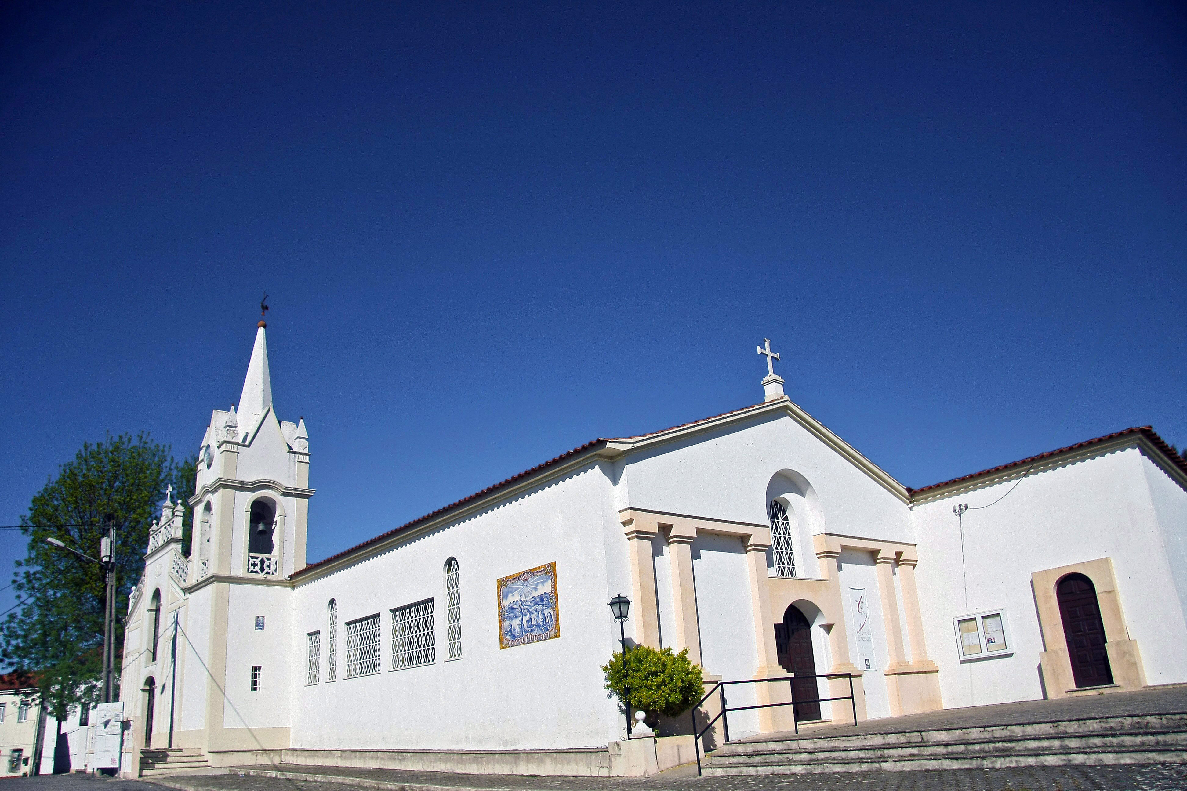 Igreja Matriz de São João do Peso - Portugal